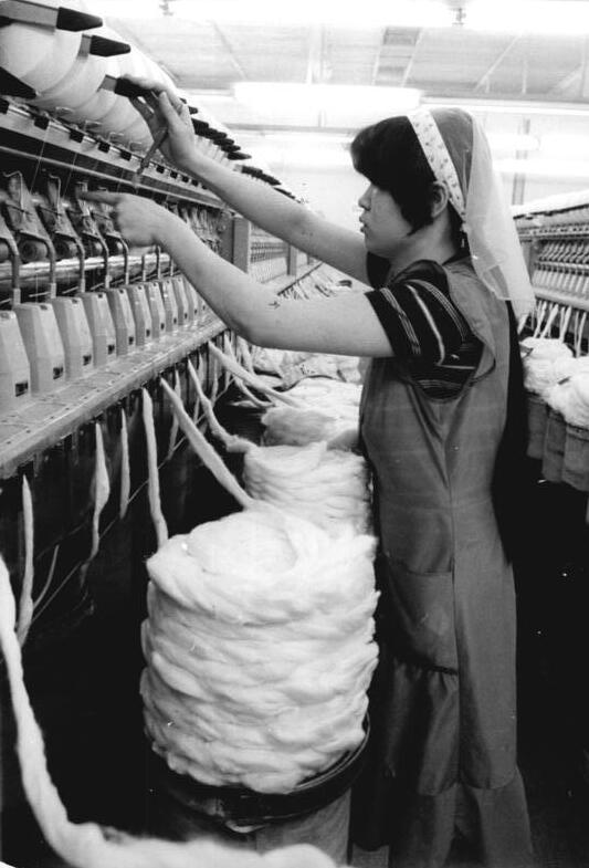 Mittweida, Auszubildende aus Vietnam ADN-ZB Ritter 2.4.87 Bez. Karl-Marx-Stadt: Ausbildung-Seit vier jahren arbeitet Nguyen thi Ngoc Kim (SVV) in der Baumwollspinnerrei Mittweida, einem Betriebsabteil des VEB Kombinat Baumwolle. Hier wurde sie von 1983 bis 1985 zum Textilfacharbeiter ausgebildet. Im Sebtember wird sie gemeinsam mit 36 landsleuten in ihre Heimat zurückkehren. Ein Teil von ihnen hat eine weiterfürhende Qualifikation zum Mechaniker erhalten.